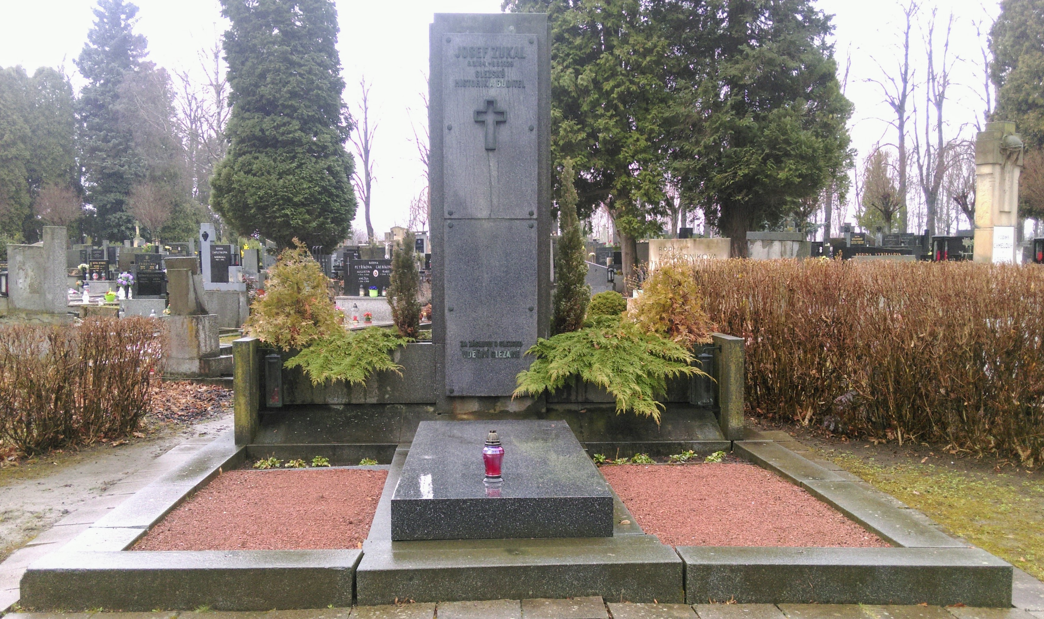 Hrob Josefa Zukal (český historik a pedagog, zakladatel moderní české historiografie ve Slezsku)